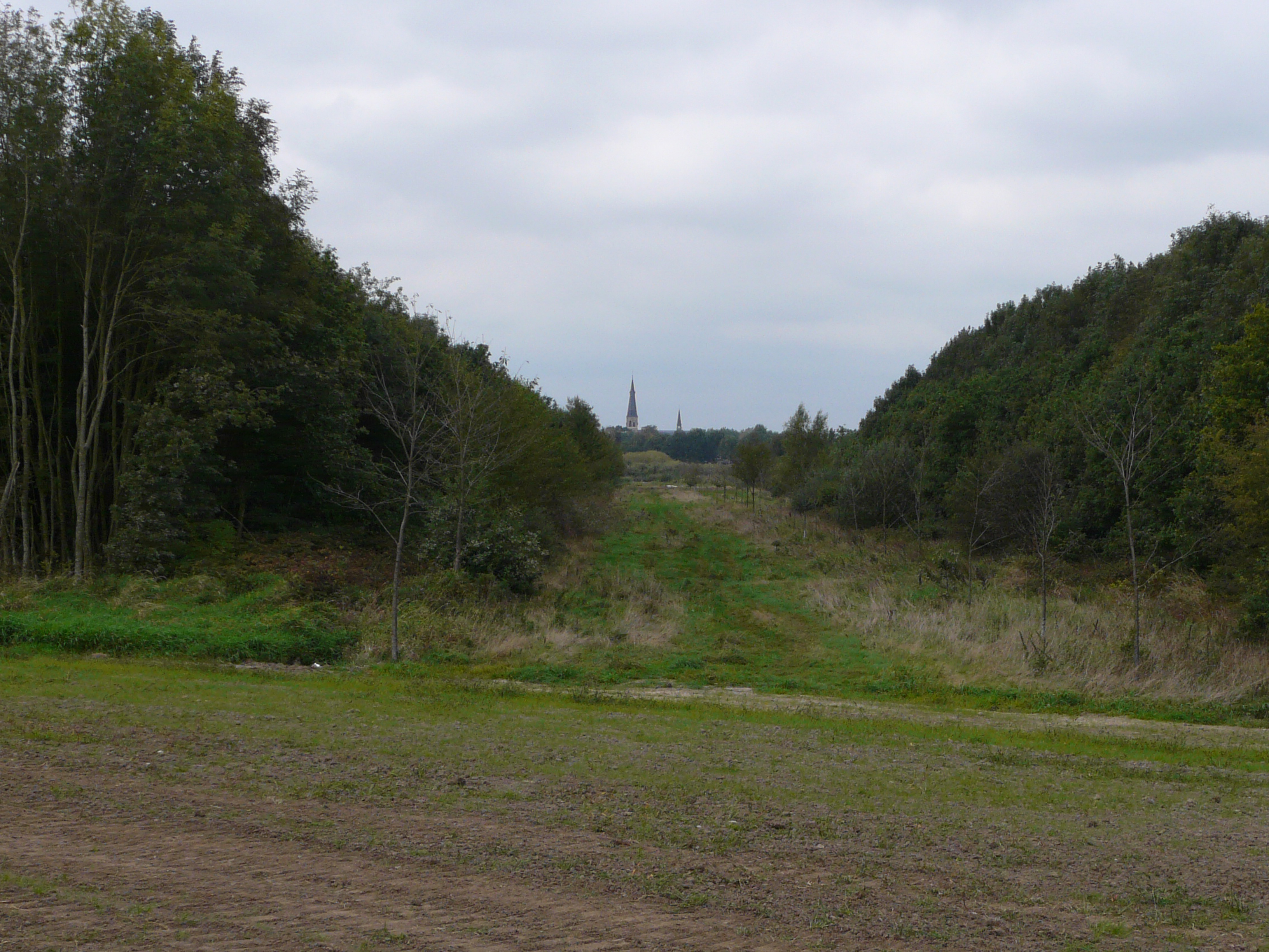 Haagse Beemdenbos nabij de wijk de Asterd in Breda